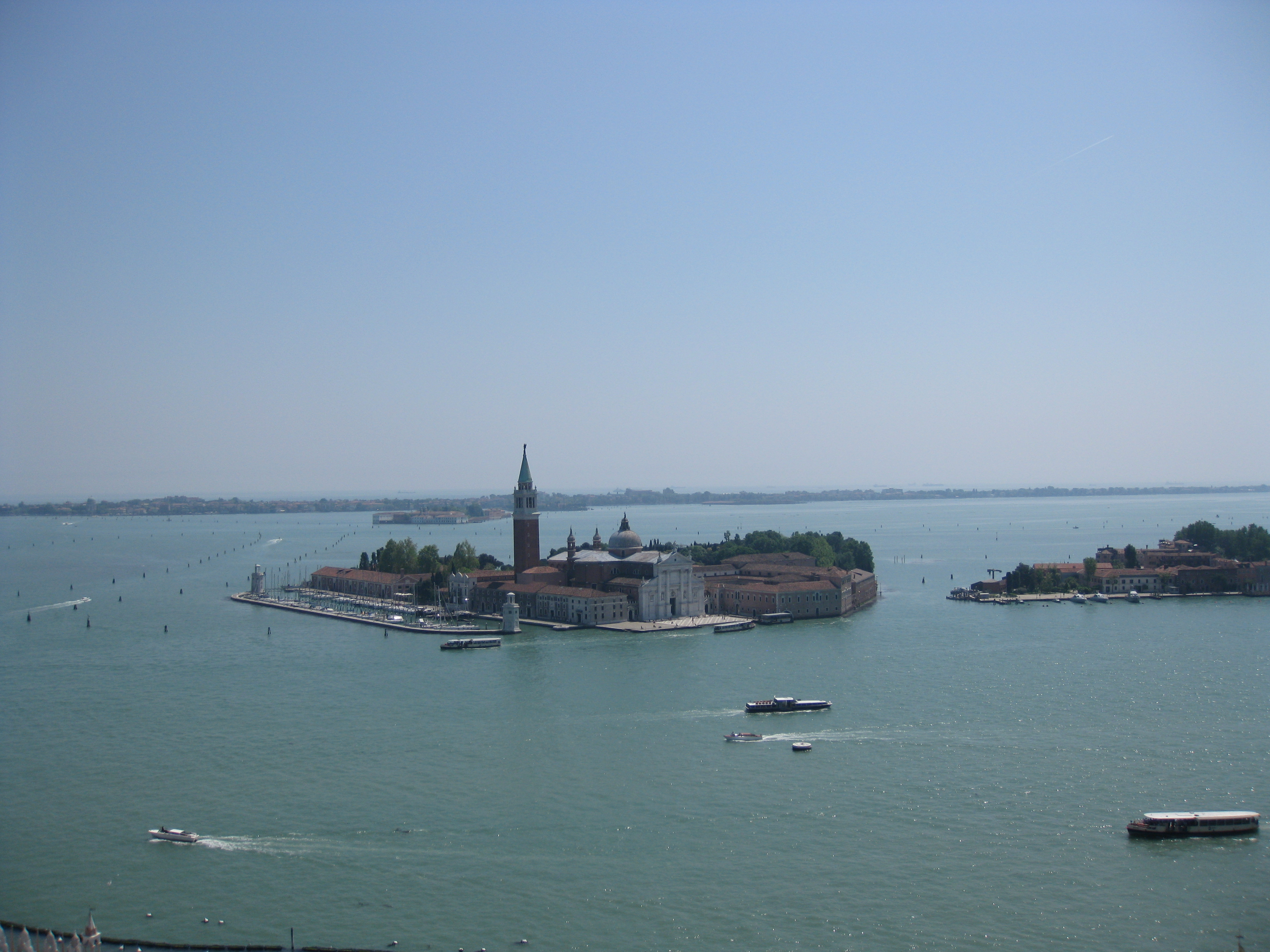 View from the Campanile of St. Marks Basilica הנוף הנשקף ממגדל הפעמונים של כנסיית סנט מרקס